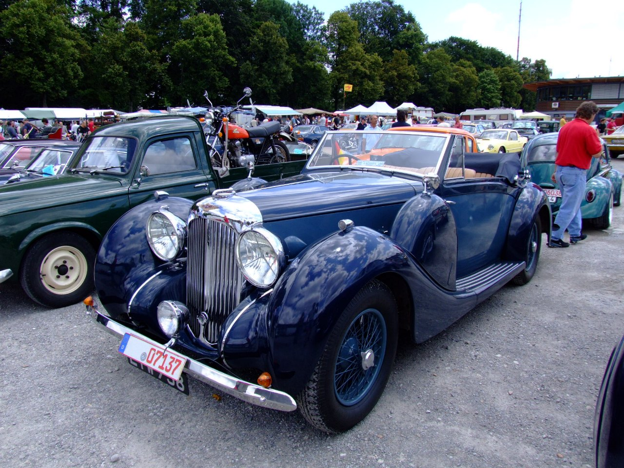 Lagonda Cabrio